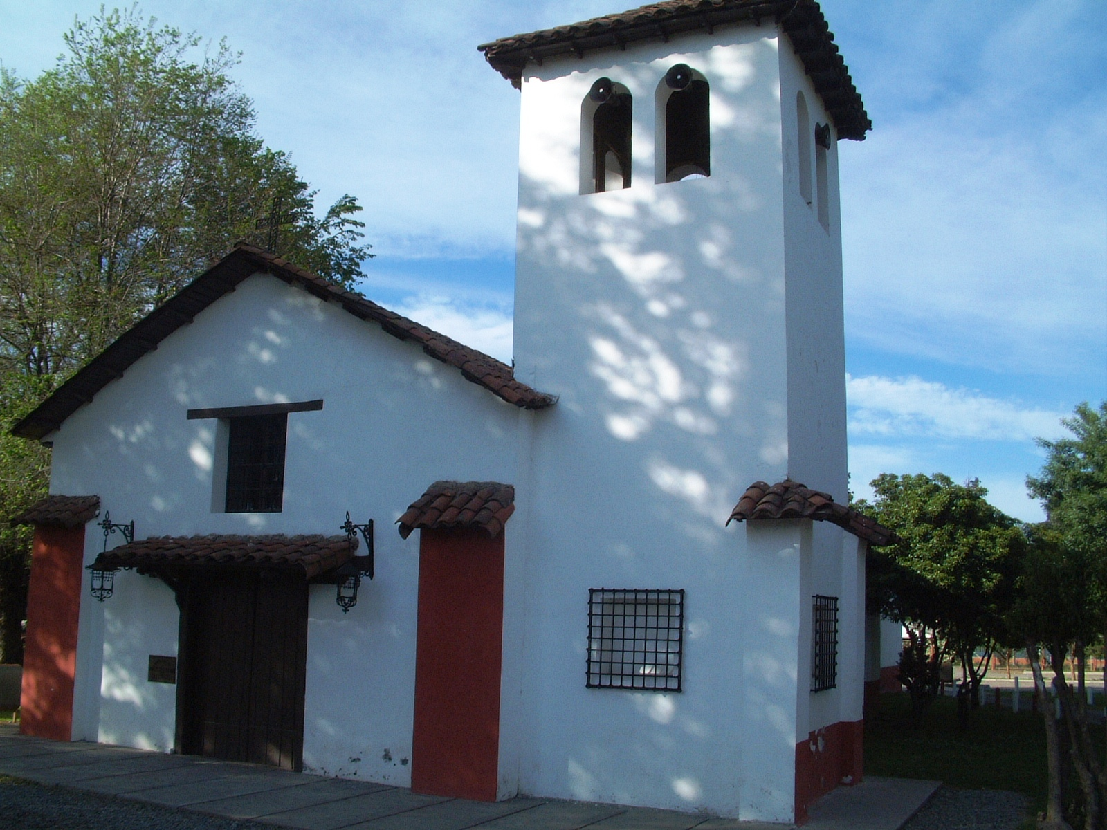 La antigua Iglesia de la Compañía,Destruida por el terremoto del año 2010, Graneros, Chile.